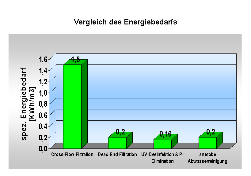 Vergleich des Energiebedarfs verschiedener Abwasserreinigundsverfahren